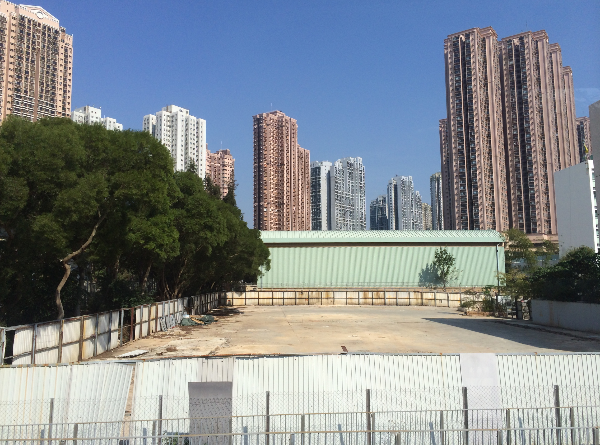 MOS Hang On Street Site